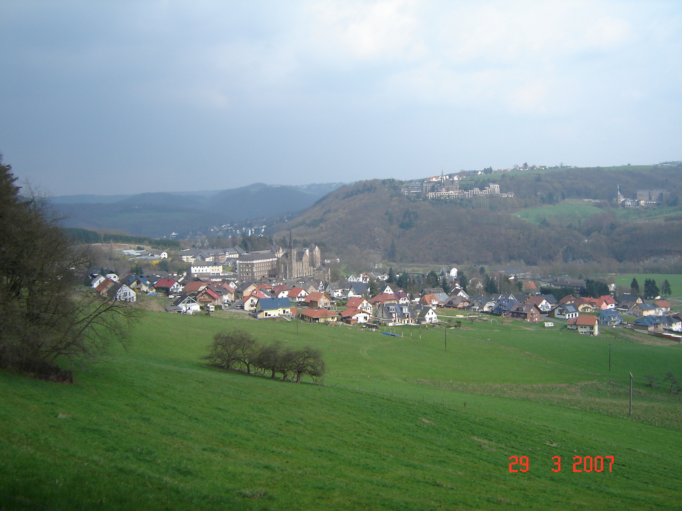 Hausen im Jahre 2007, im Hintergrund ist Waldbreitbach zu erkennen, oben rechts das "Marienhaus Waldbreitbach" sowie im Hintergrund auf dem Berg ist Breitscheid-Hochscheid zu sehen.